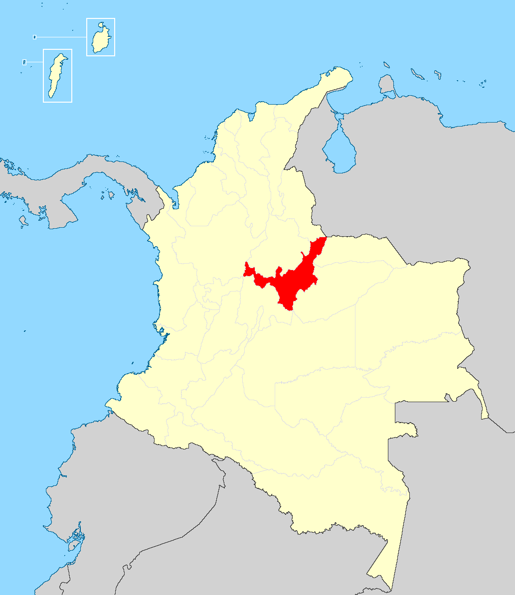 Mapa del departamento de Boyacá en Colombia sin Bogotá